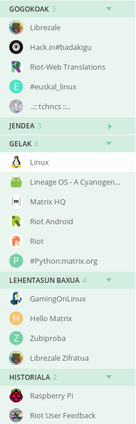 Librezale taldekide batek egindako pantaila argazkia Riot erabili bitartean